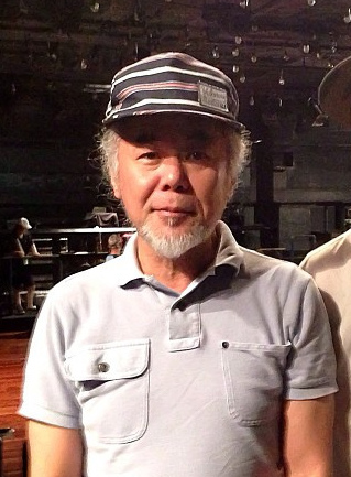 14日はヤン富田さんといっしょにライブ！やばいっす！2013.9.14(Sat.) リキッドルーム９周年記念イベント 『ヤン富田コンサート』